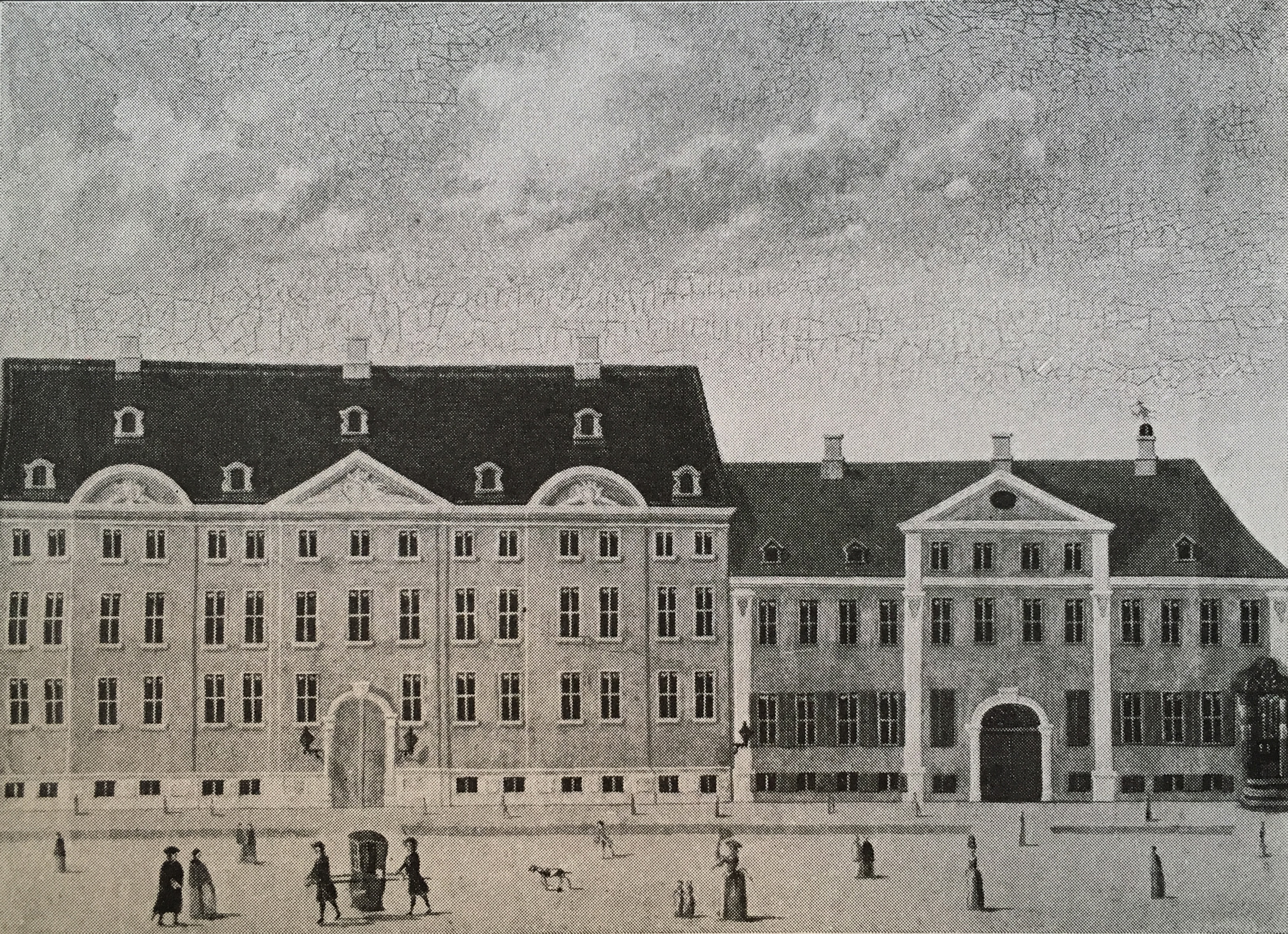 Til venstre: Kongelig køkkeninspektør Beckers gaard, Købmagergade 44, København. Bygget rett etter 1740